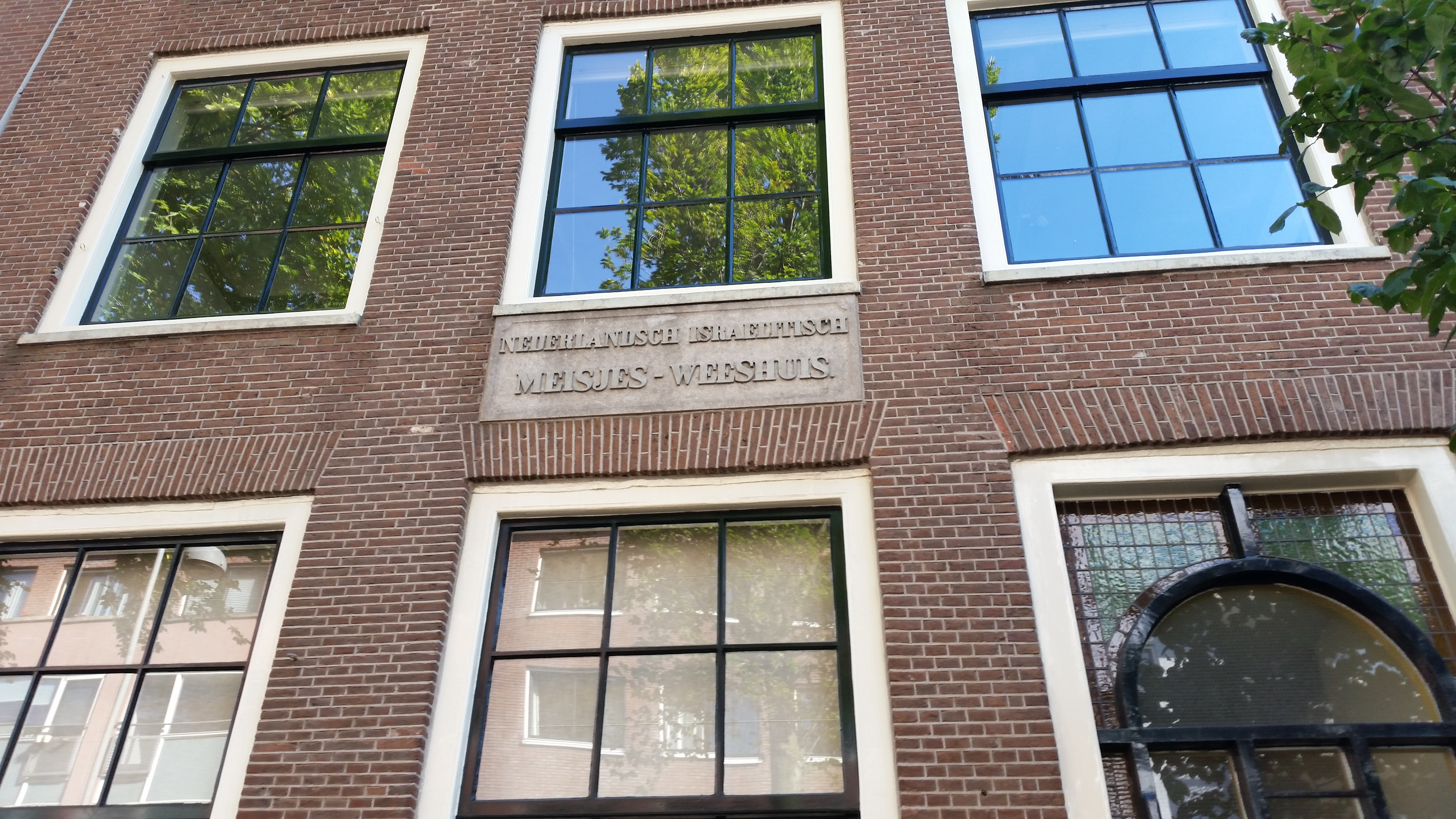 Rapenburgerstraat 171, Amsterdam, gevelsteen